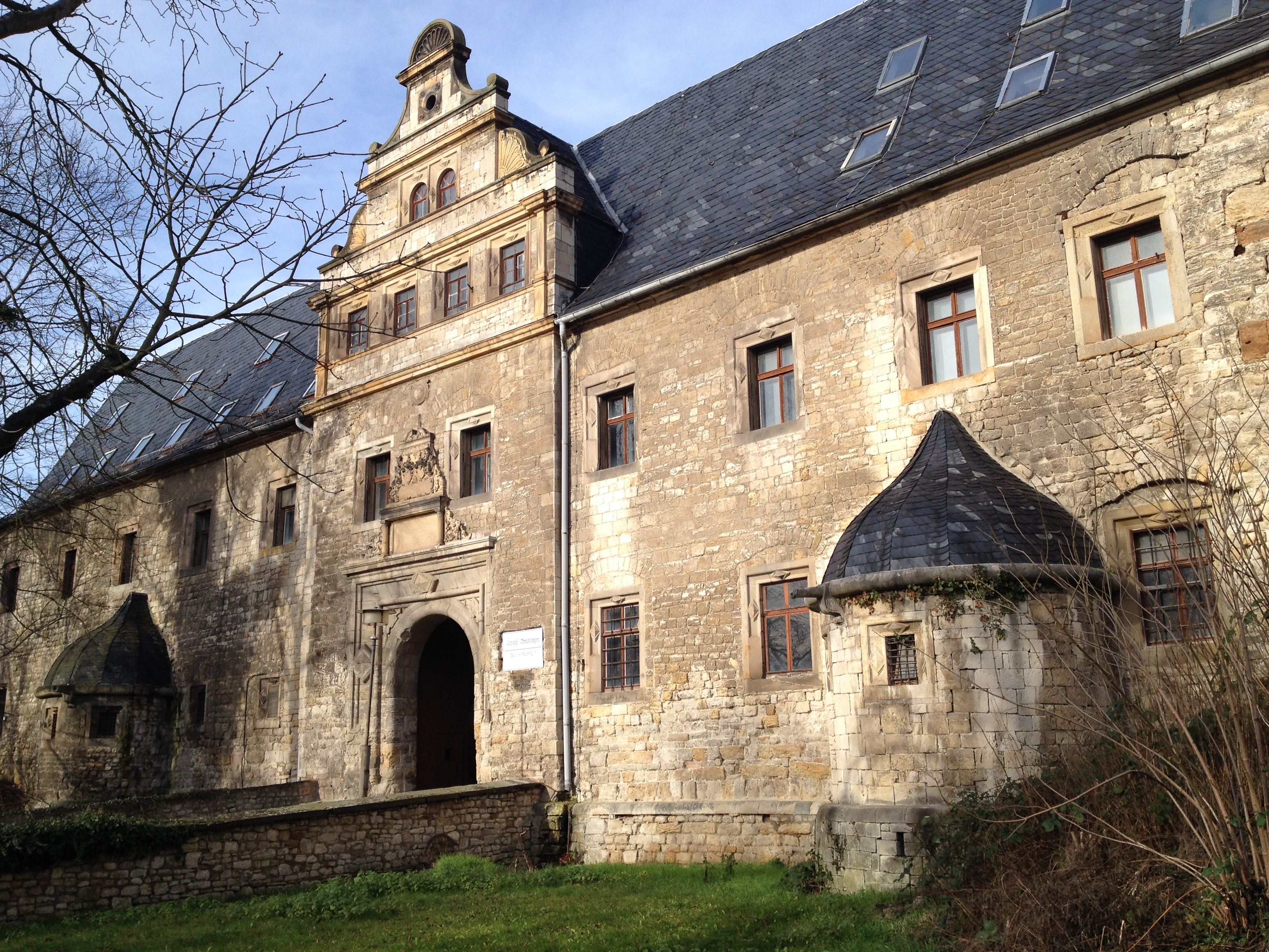 Schloss Beichlingen